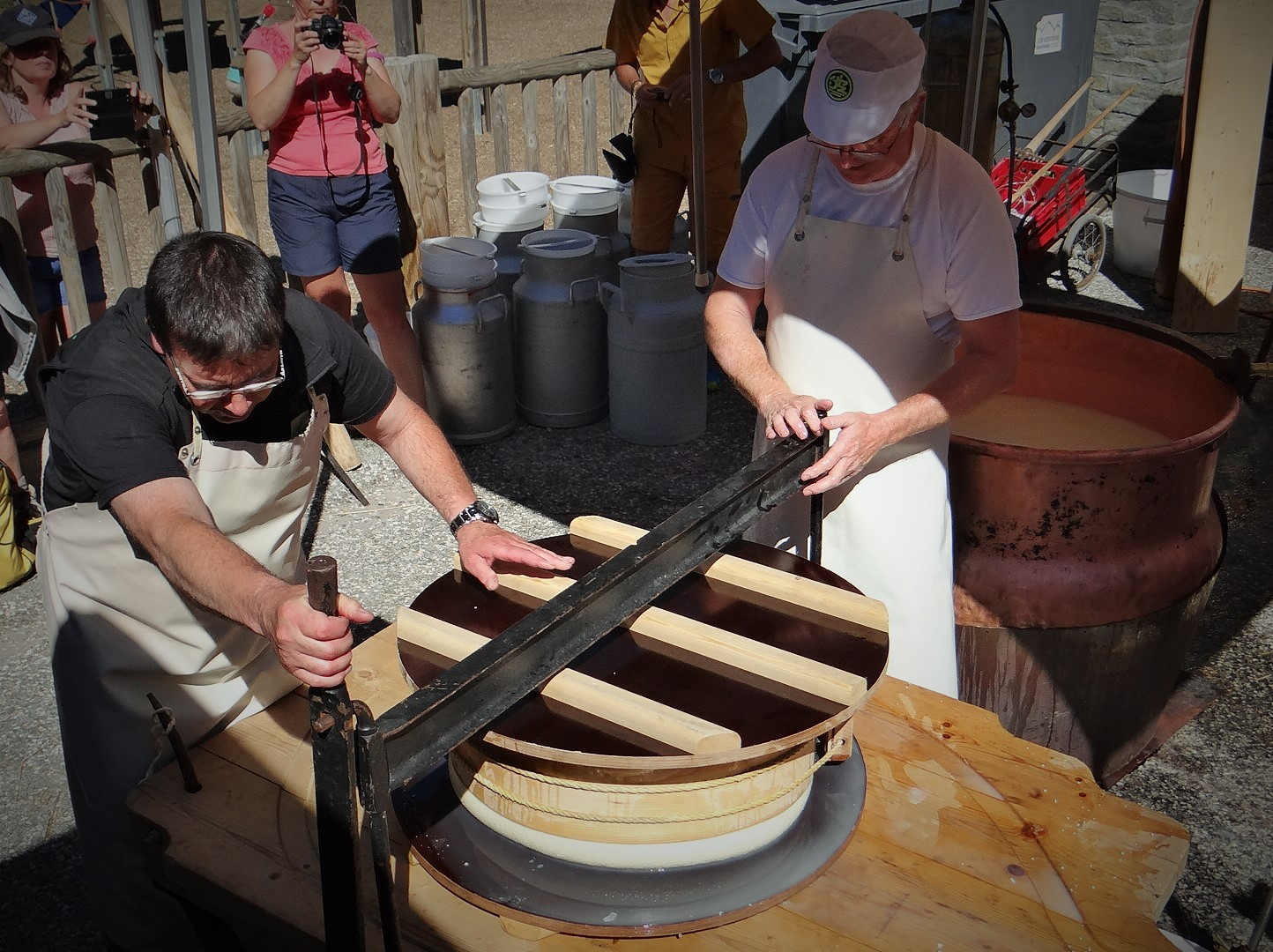 Fabrication traditionnelle du Beaufort par la Coopérative Laitière de Moutiers lors de la fête de l’Alpe et des Guides de Pralognan-la-Vanoise, 17 juillet 2016 ː le pressage